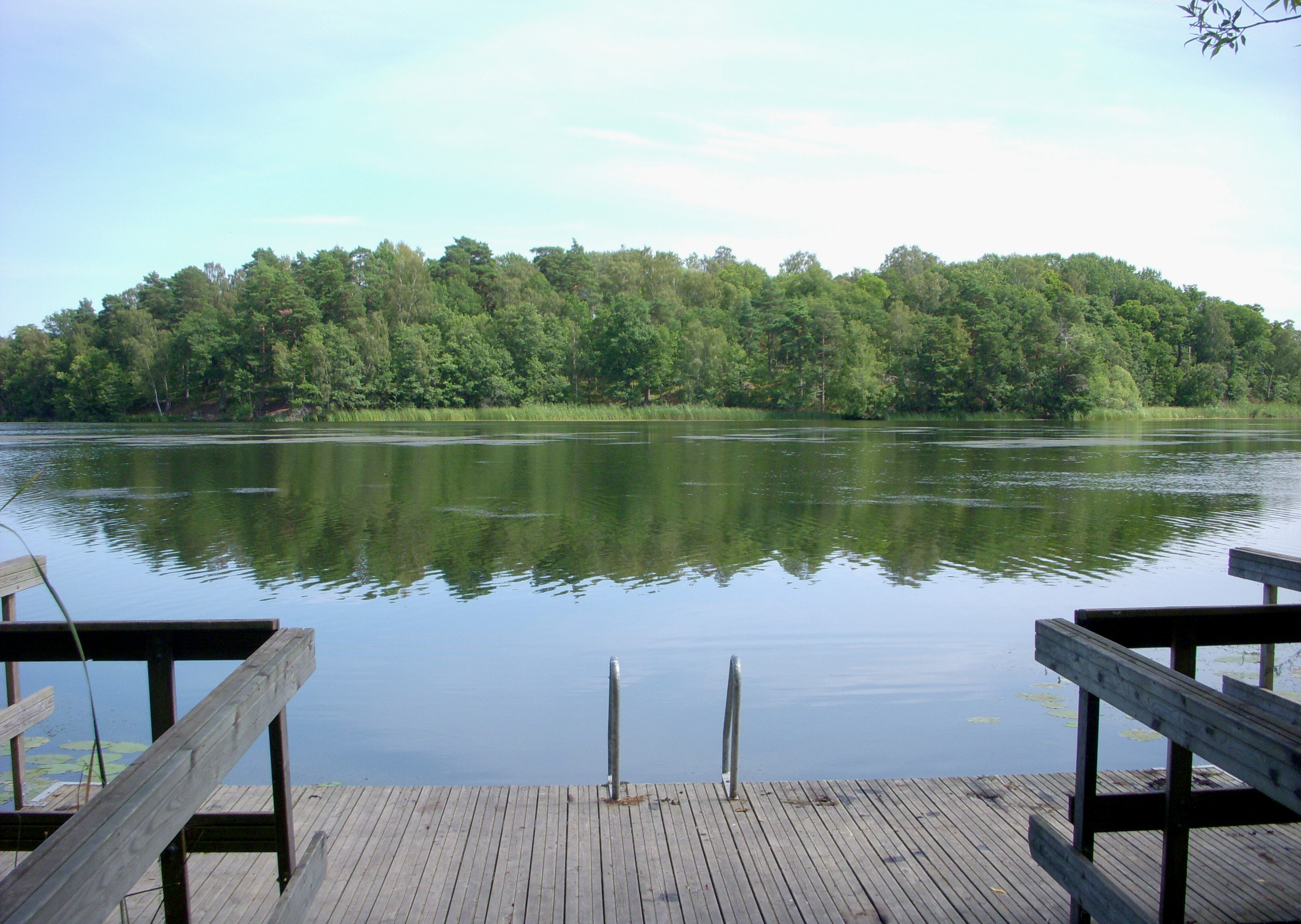 Vy över sjön Aspen med Ekholmens naturreservat